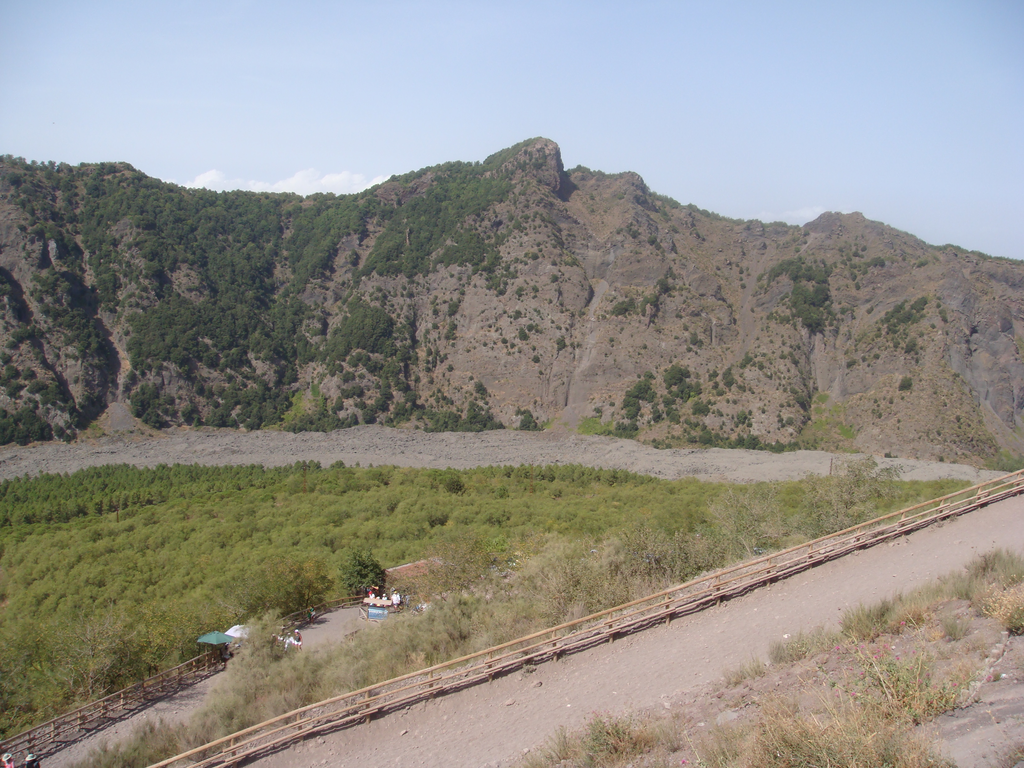 Punta del Nasone ripresa dal cono del Vesuvio. La Punta del Nasone è la cima più alta del Monte Somma facente parte del complesso Somma-Vesuvio.